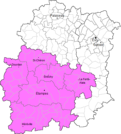 Carte des communes de l'arrondissement d'Étampes (91)